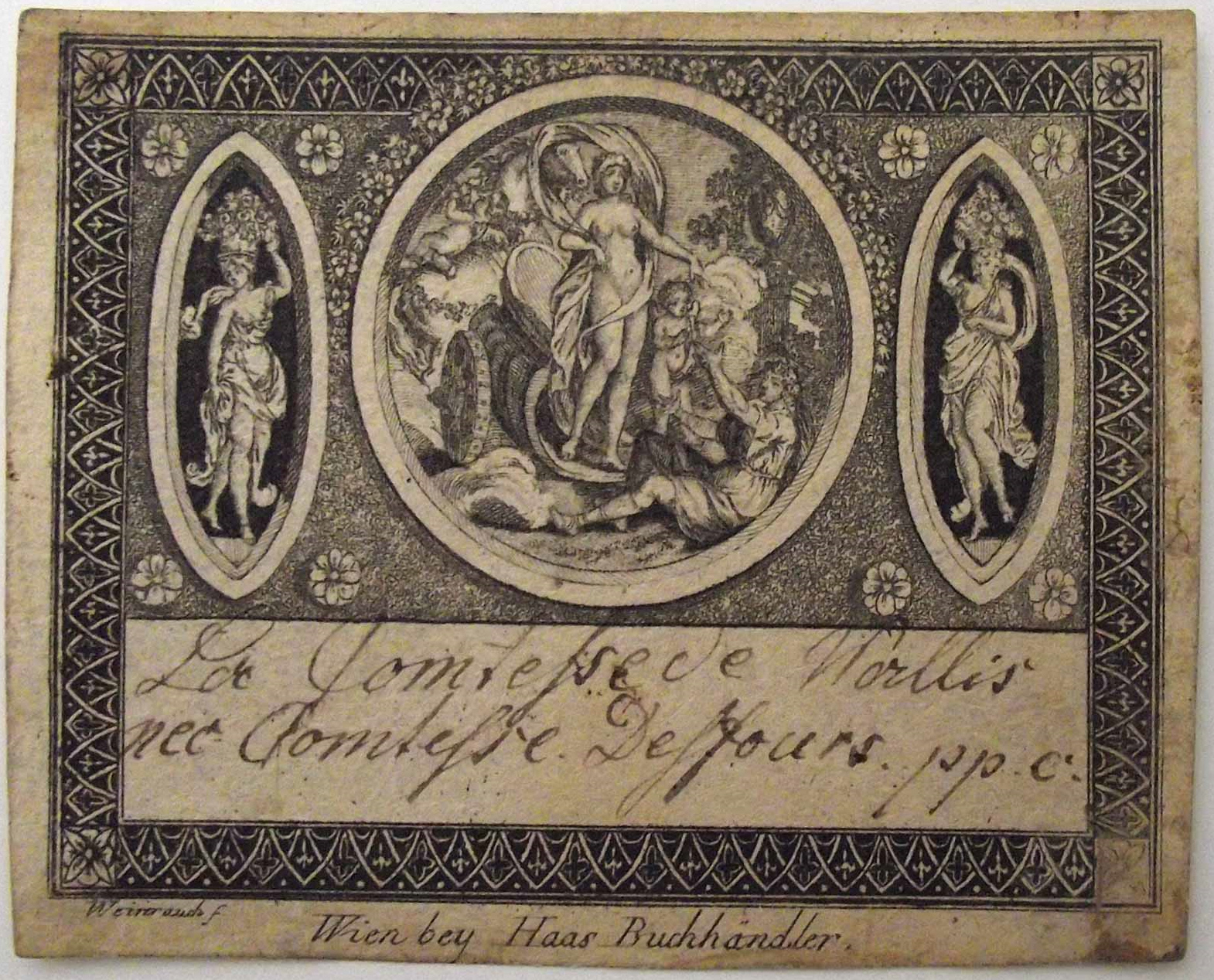 "La Comtesse de Wallis née Comtesse Desfours ppc." Kupferstich v. Weinrauch bei Haas, Wien um 1800. Blattgröße 7,2 x 9,2 cm